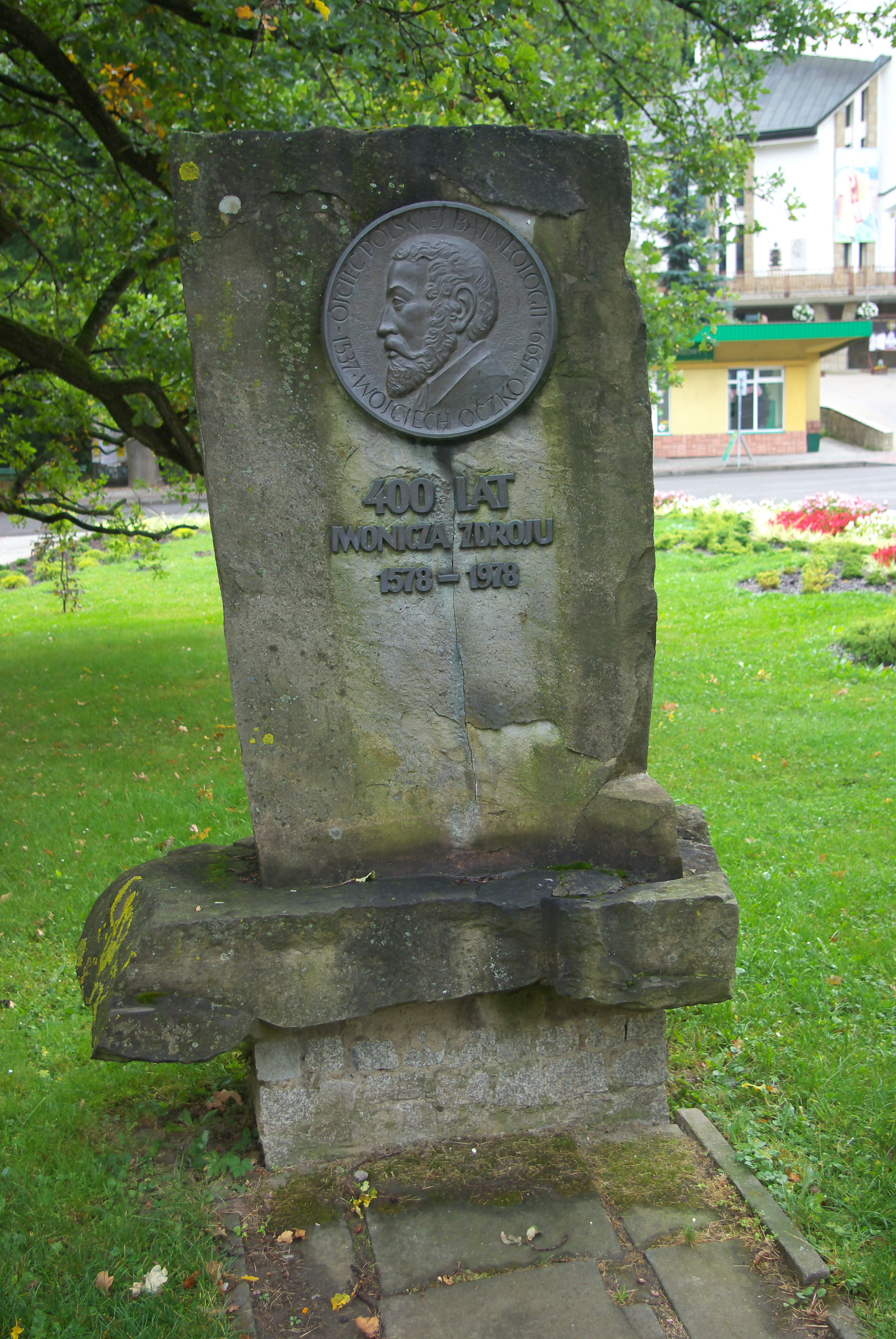 Pomnik upamiętniający Wojciecha Oczko w Iwoniczu-Zdroju